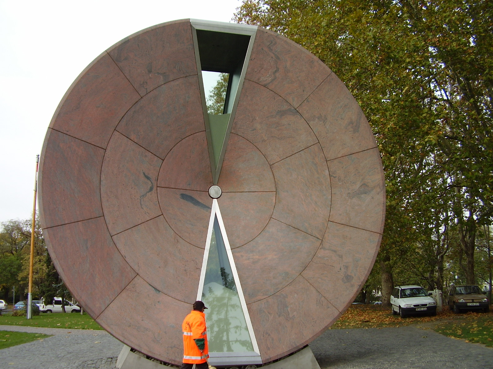 Timewheel in Budapest.